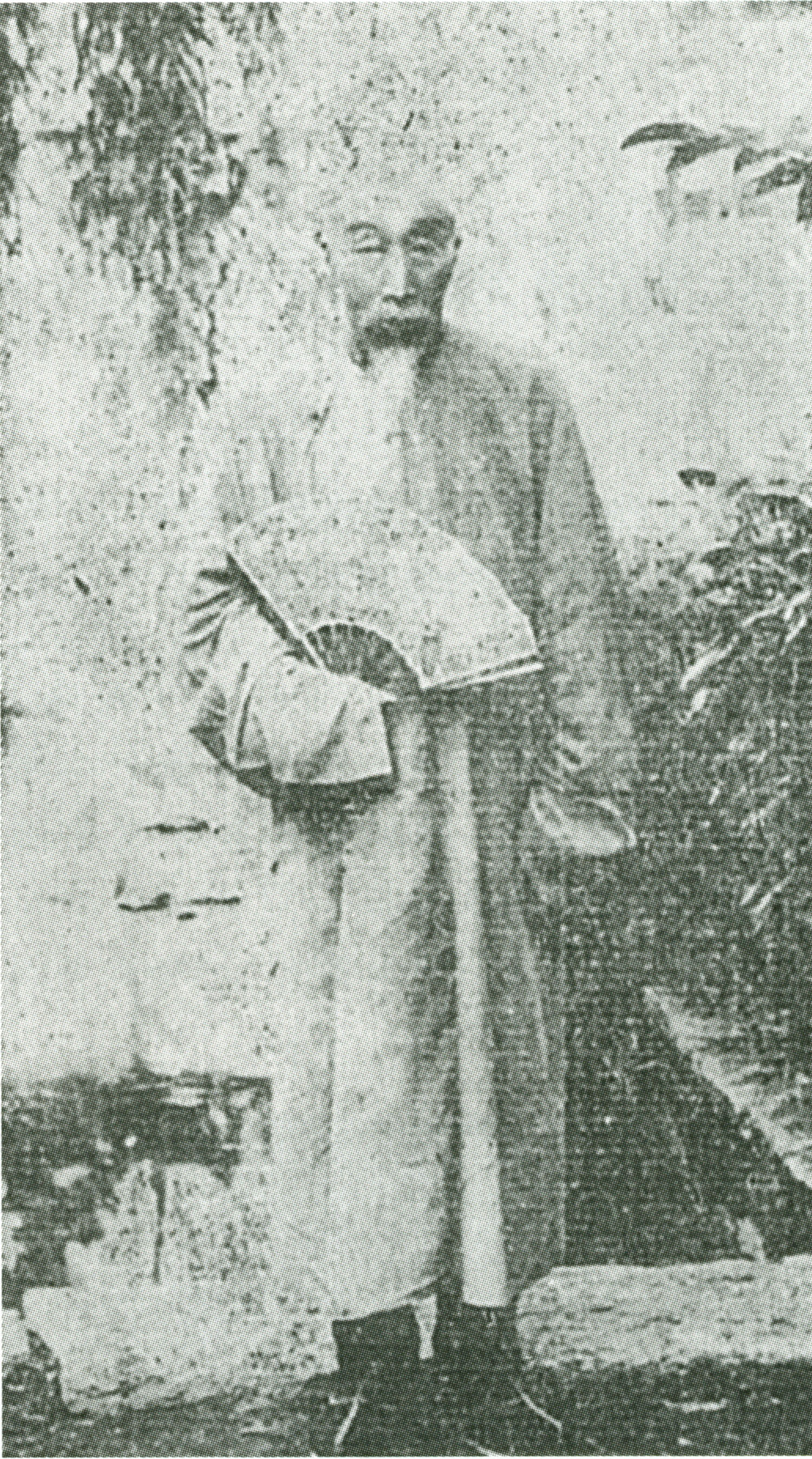 孫葆田（1840年－1909年），字佩南，山東榮成人。晚清官員。